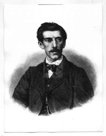 Fotografía de Melchor de Santiago Concha y Toro —adoptó el nombre de Melchor de Concha y Toro mientras fue senador— (Santiago, 10 de octubre de 1833 – ibídem, 21 de julio de 1892) fue un empresario, abogado y político chileno, marqués de Casa Concha.